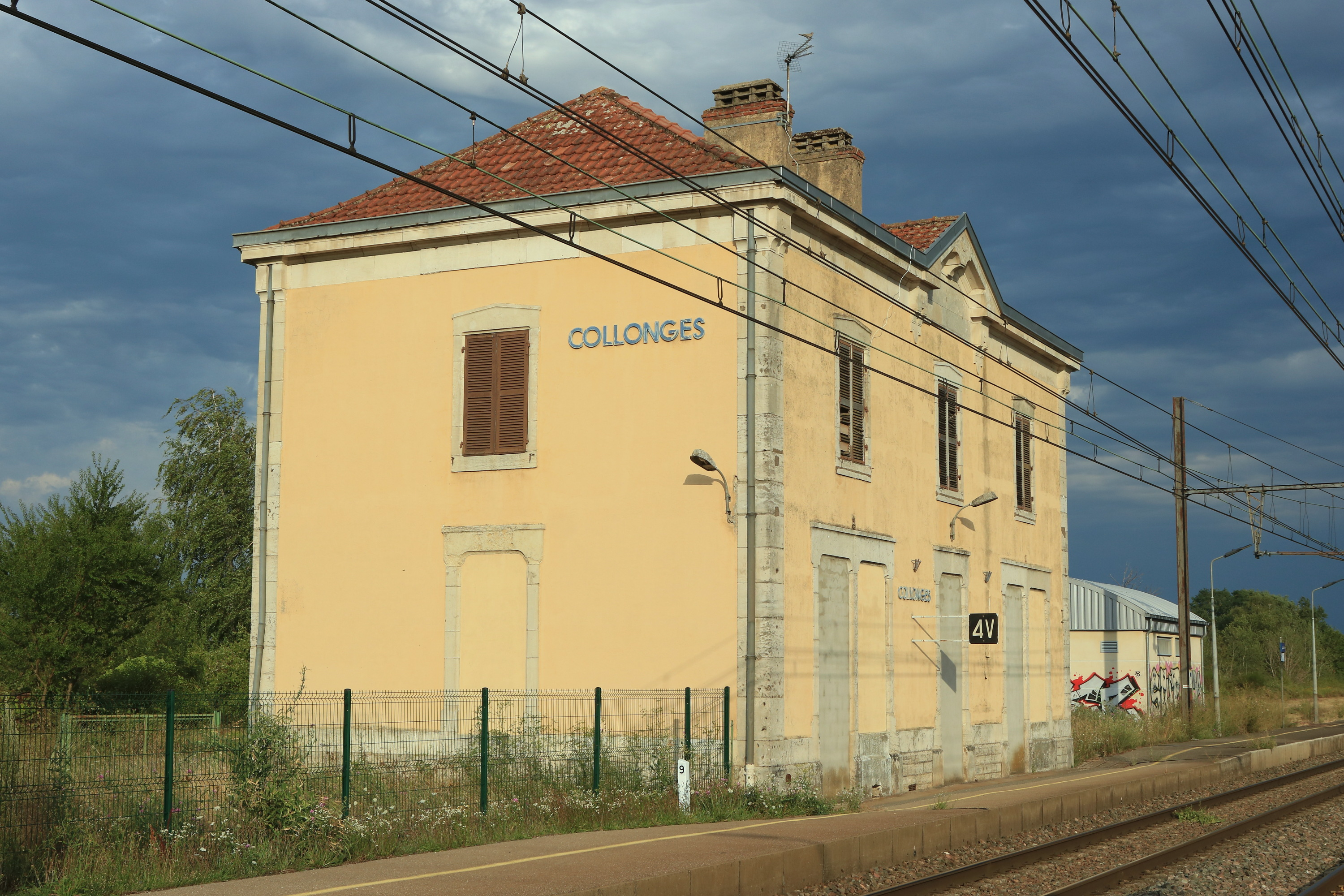 Ancien bâtiment voyageurs de la gare de Collonges.